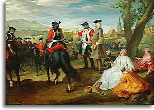 "Revue de mousquetaires noirs dans la plaine des Sablons" (Oil on canvas, 106 x 147cm. Inv. MV 4402, Versailles, musée national du château et des Trianons)